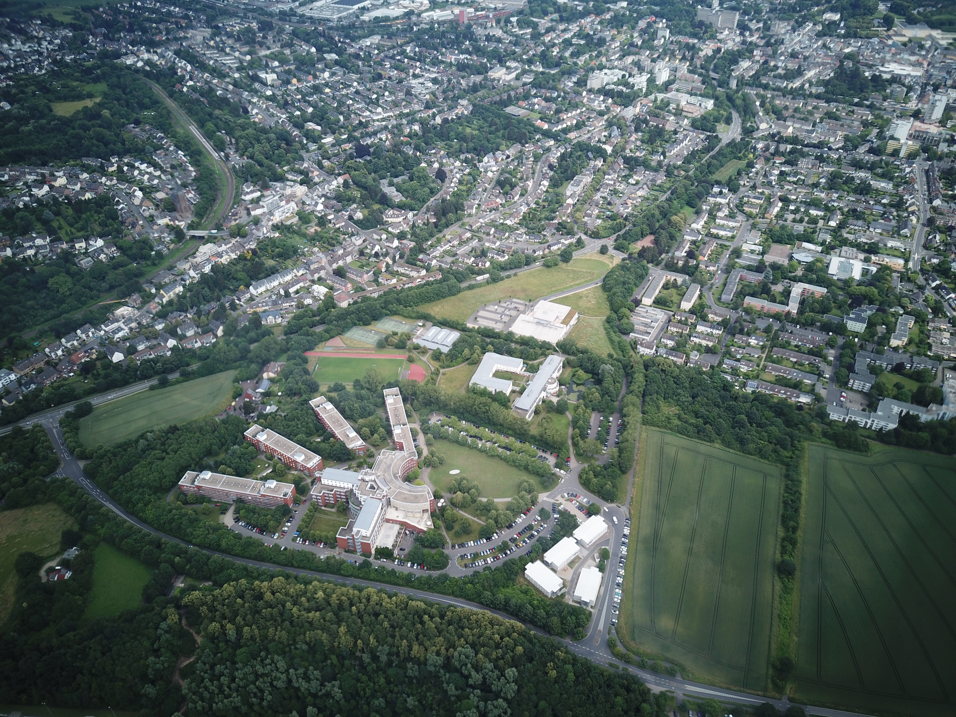 Blick aus der Luft auf den Campus der Hochschule für öffentliche Verwaltung des Bundes und der Bundesfinanzakademie